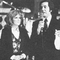 Corrado e Orietta Berti al Festival di Sanremo 1974